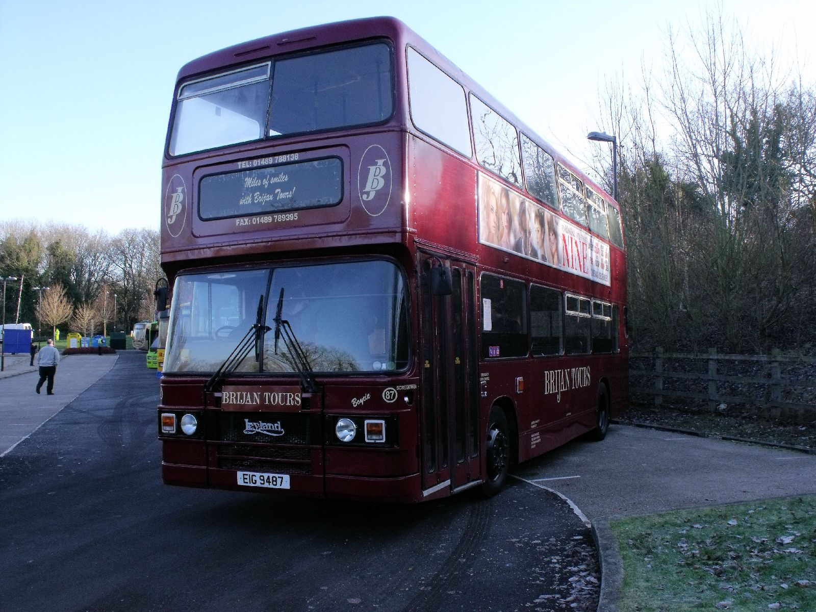 Brijan 87 EIG 9487 (C121 CHM)